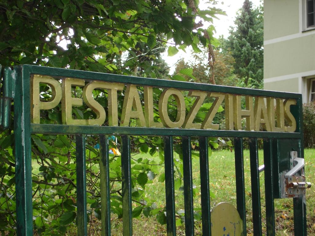 Pestalozzi-Stiftung Hamburg gate in the Diestelstraße